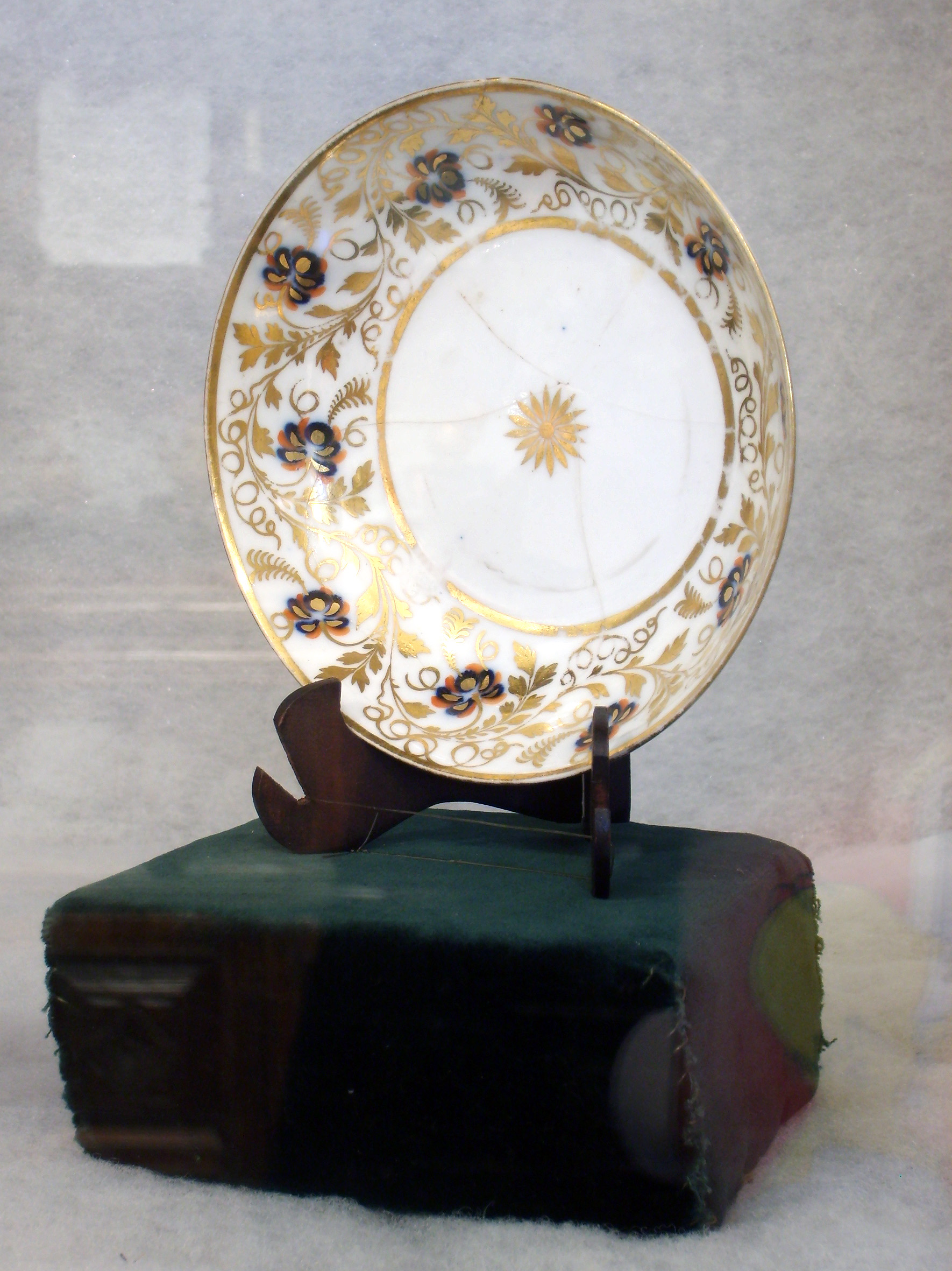 Plato de porcelana perteneciente a José Santiago Rodríguez Zorrilla, Obispo de Santiago. Se encuentra en el Museo del Carmen de Maipú, en Santiago de Chile.